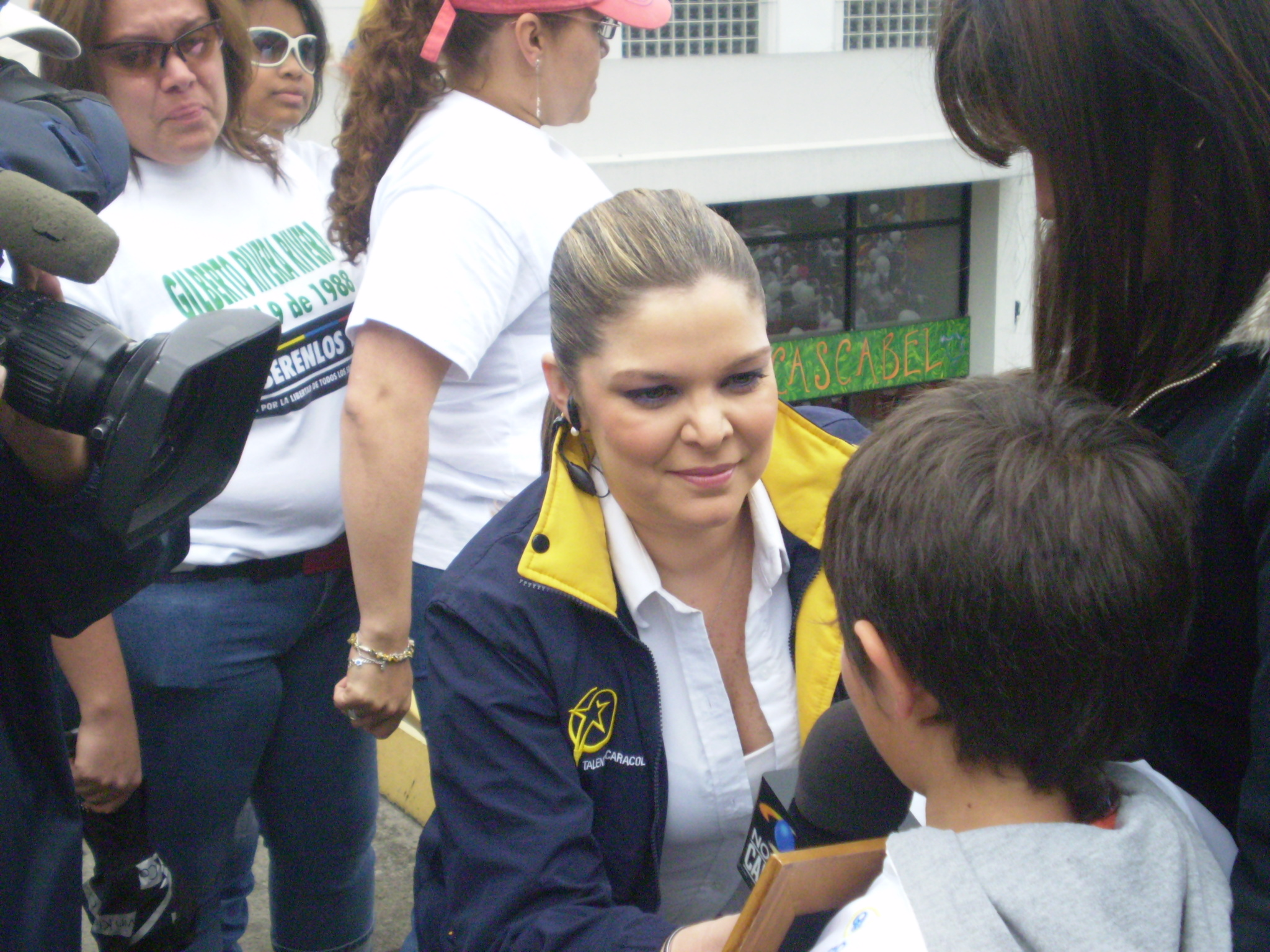 Presentadora de Noticias Caracol en una marcha el 20 de julio de 2008